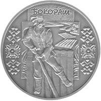 Монета Бокораш срібна реверс